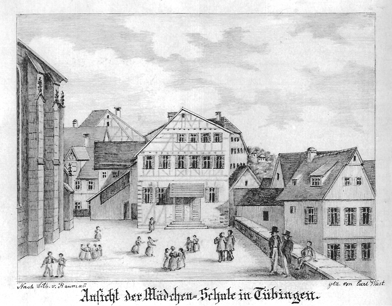 Ansicht der Mädchen-Schule in Tübingen [auf dem Platz hinter der Stiftskirche] (Bleistiftzeichnung nach Lithographie, Motiv 12,3 x 16,5 cm; Blatt: 21,7 x 26,4 cm); Schefold 9441